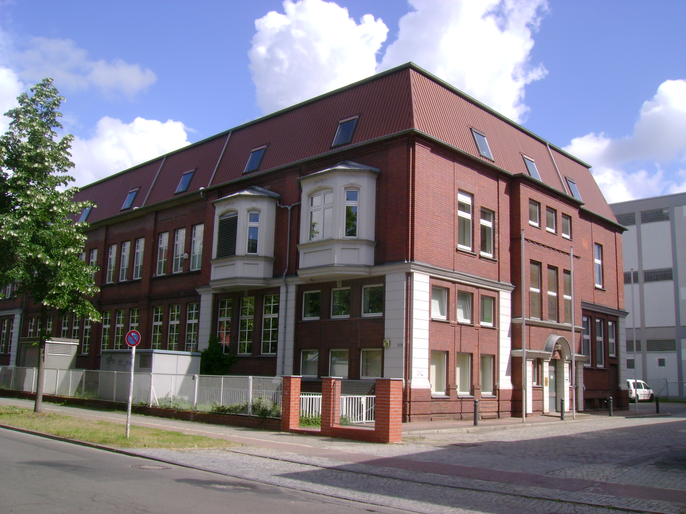 Berlin-Borsigwalde, Breitenbachstraße 34-36; Verwaltungsgebäude der ehemaligen Altmärkisches Kettenwerk GmbH (Alkett).